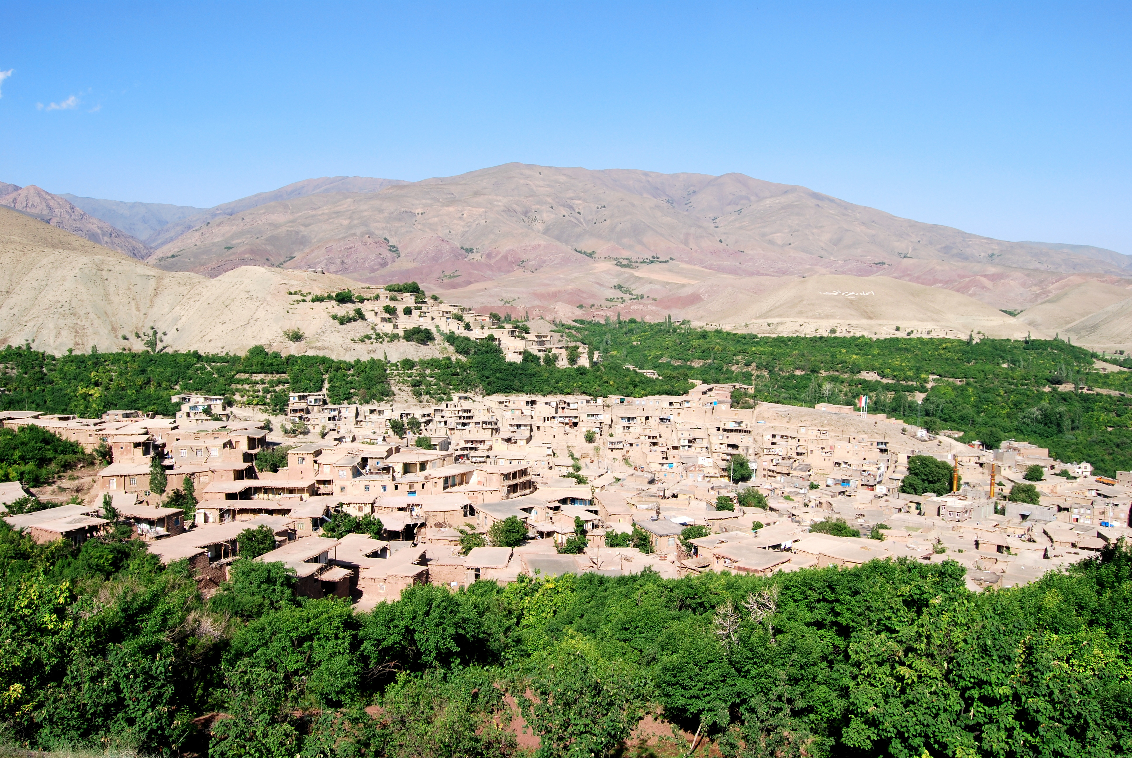 روستای خرو در خراسان